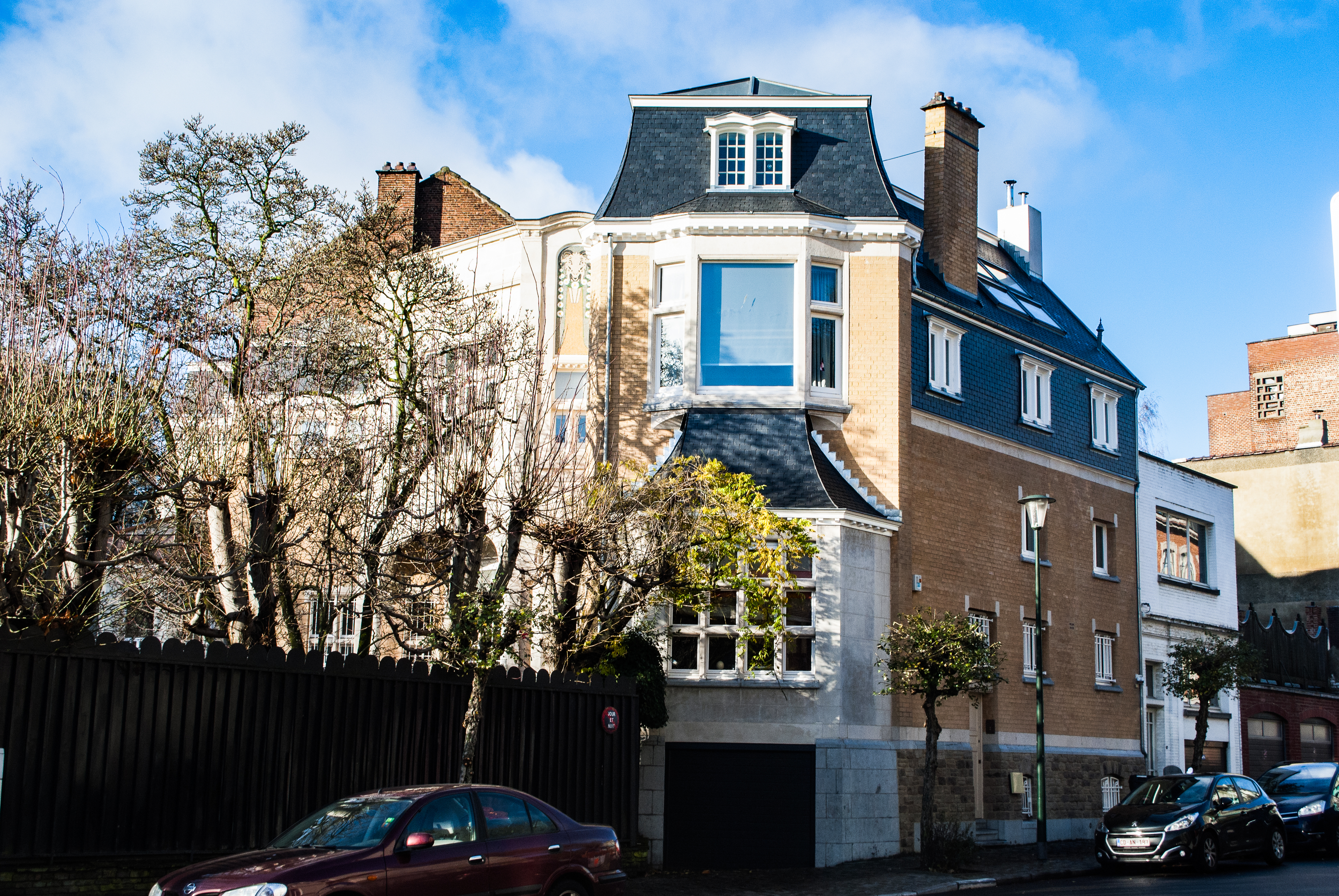 Maison Dubois, Avenue Churchill 110, Uccle